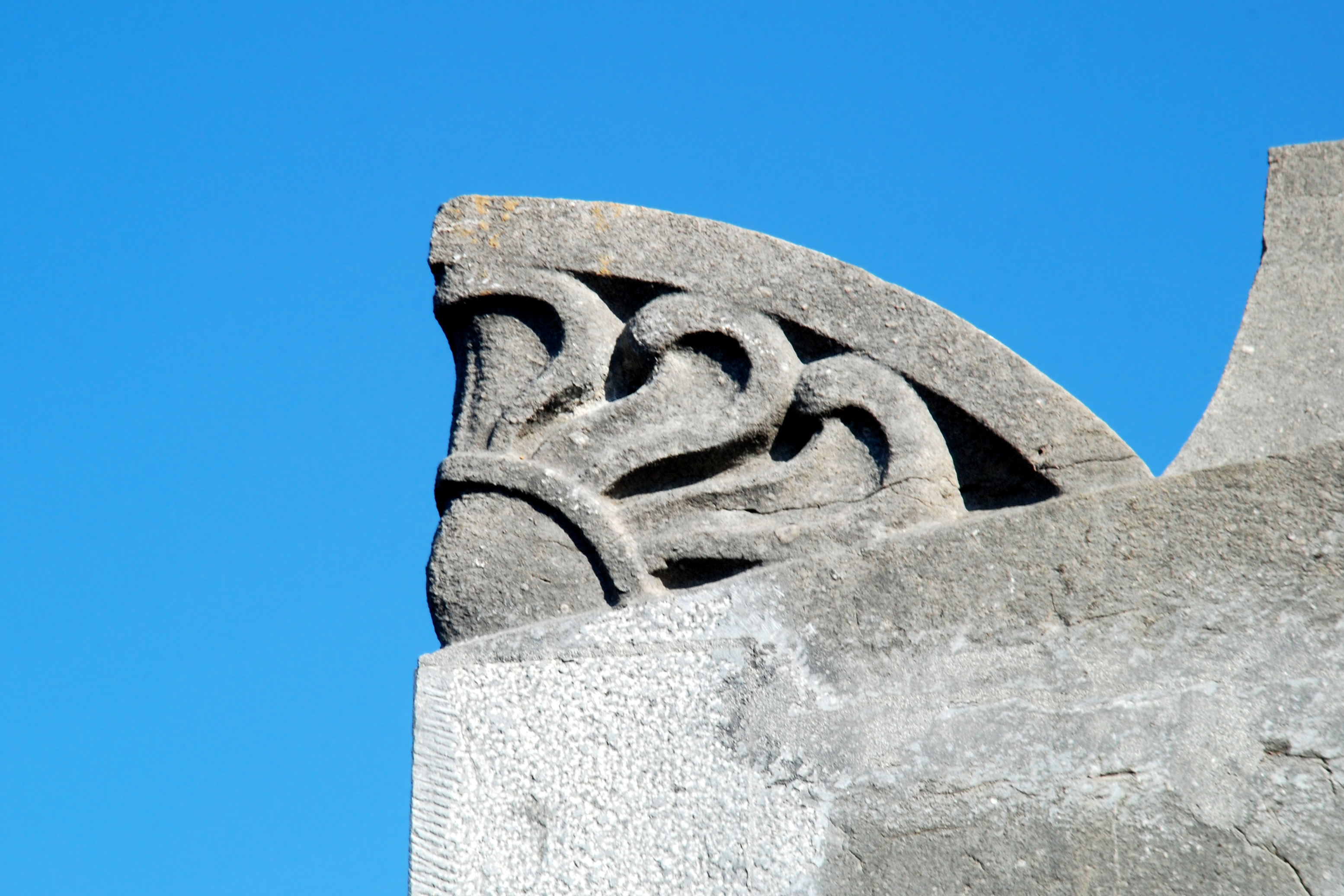 Belgique - Brabant wallon - Monument Gordon